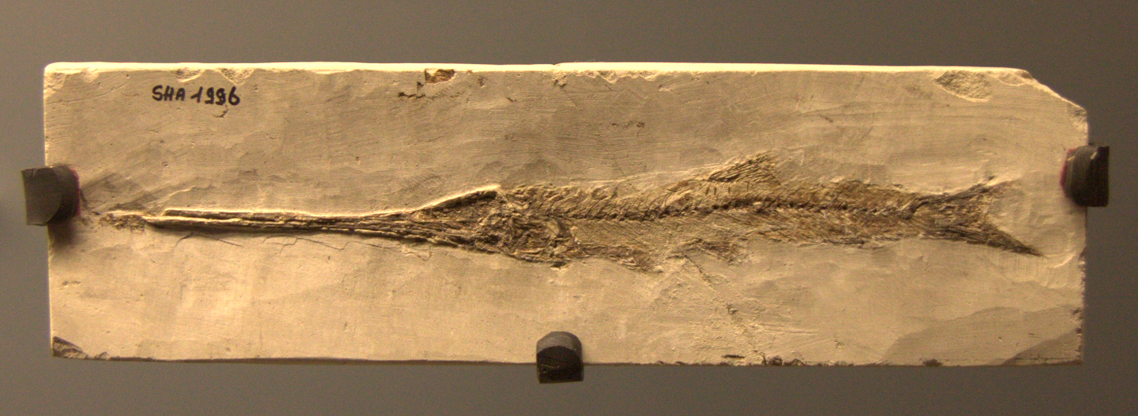 Daté d'environ 85 millions d'années, il est considéré comme proche du poisson-lancier actuel. Il a été découvert à Sahel Alma au Liban. The making of this document was supported by Wikimédia France. (Submit your project!)